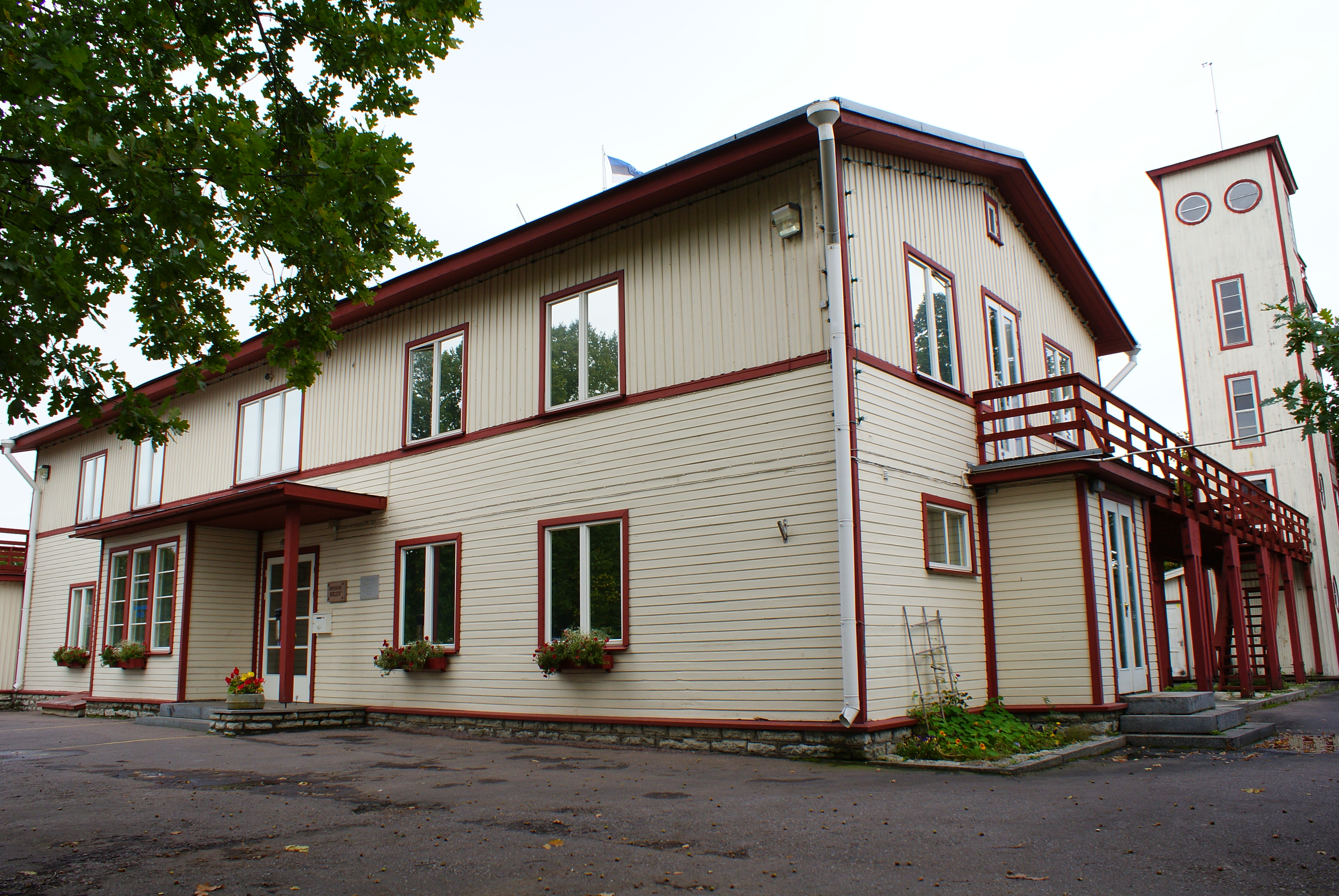 Kalevi jahtklubi hoone